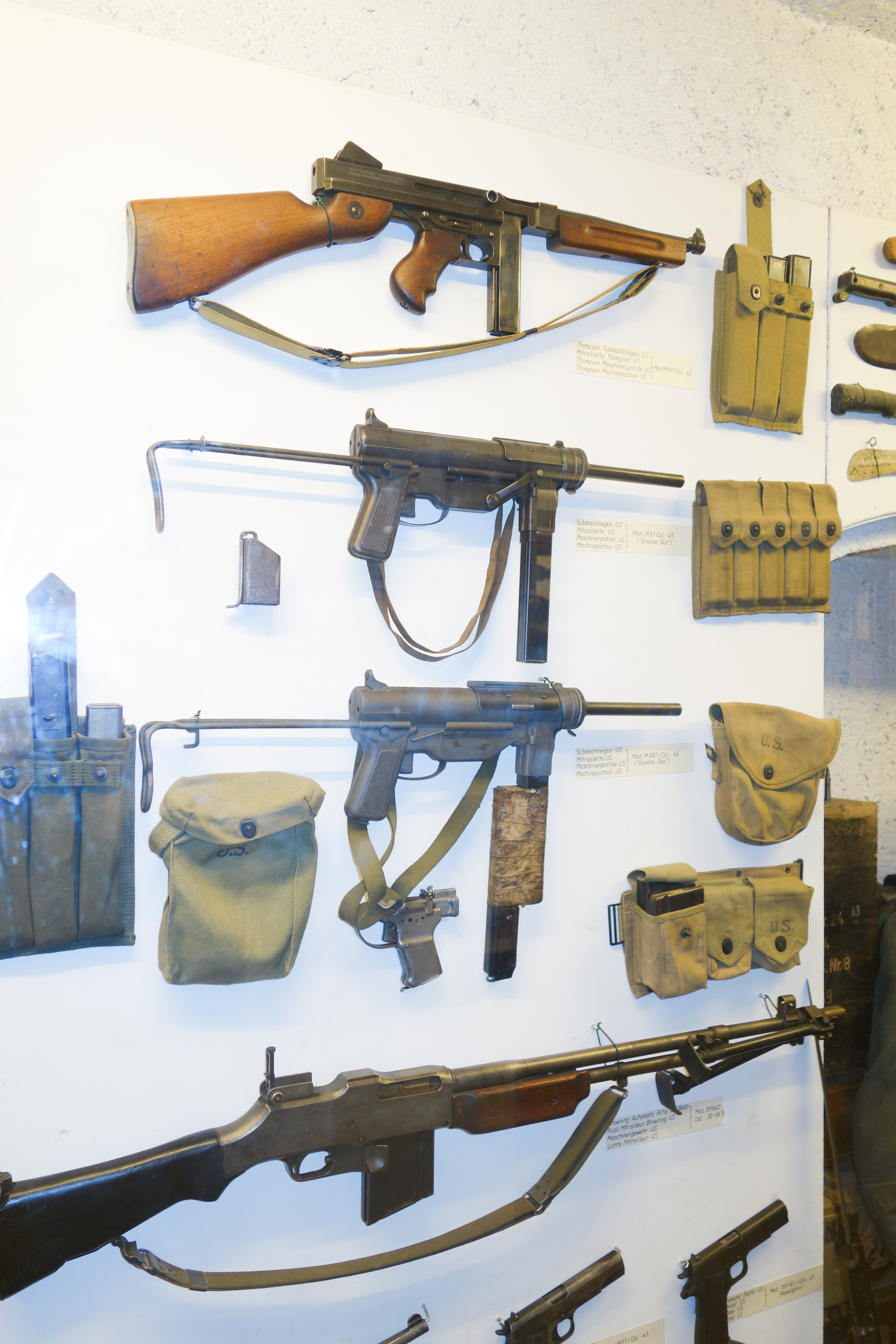 Luxembourg 2015